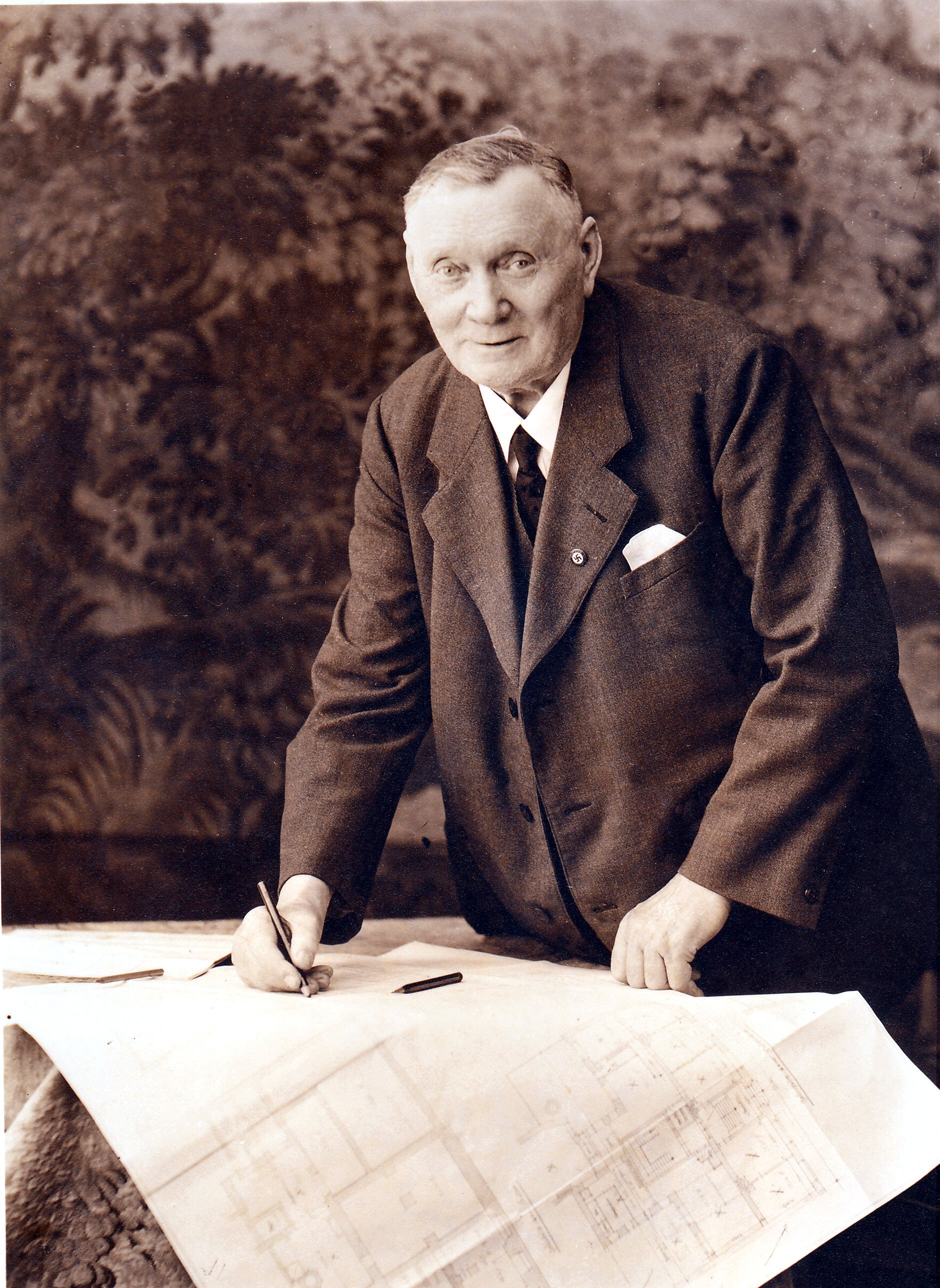 Konrad Unglaub 1.5.1938 an den Bürgermeiser und die Bürger von München